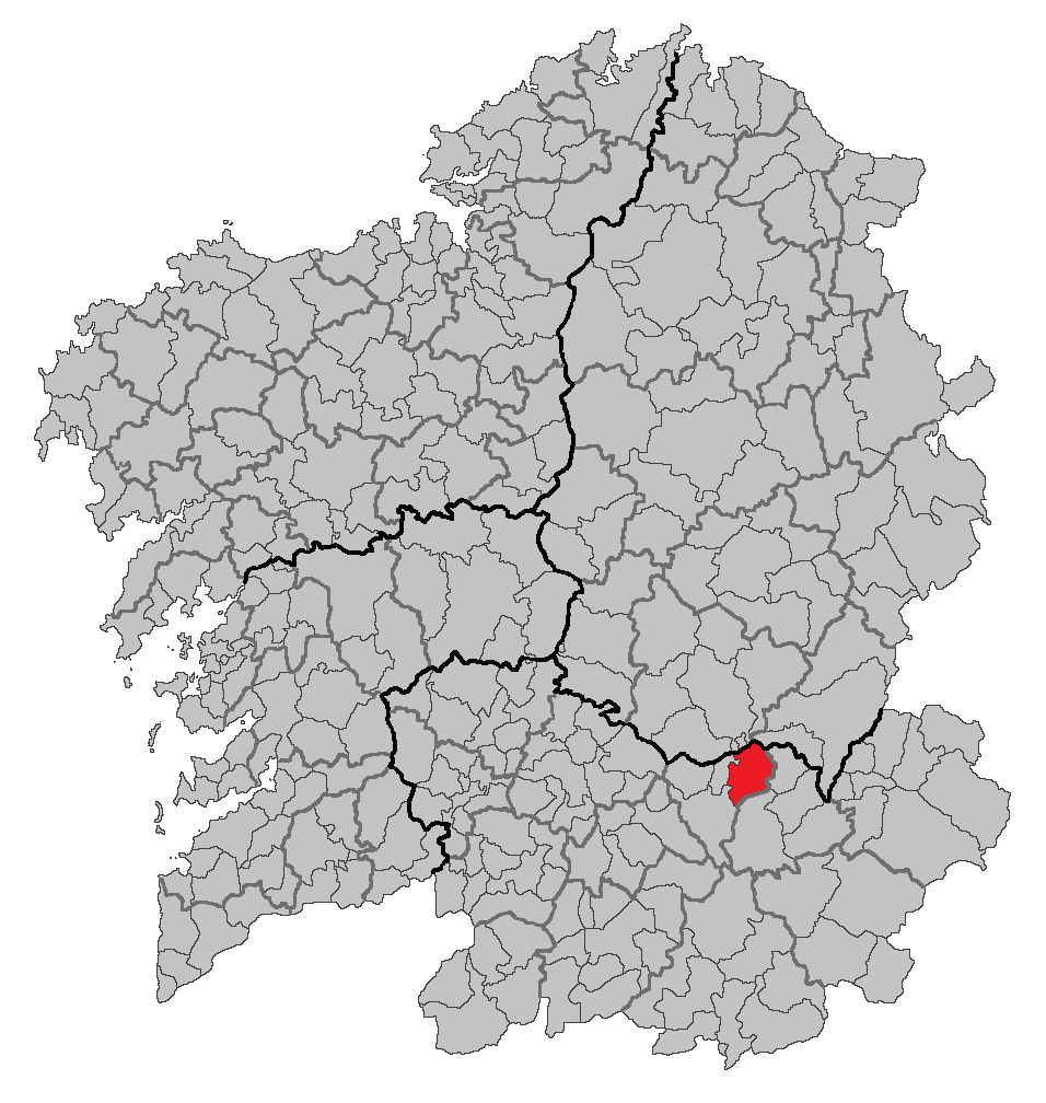 Mapa coa localización do concello de Castro Caldelas.